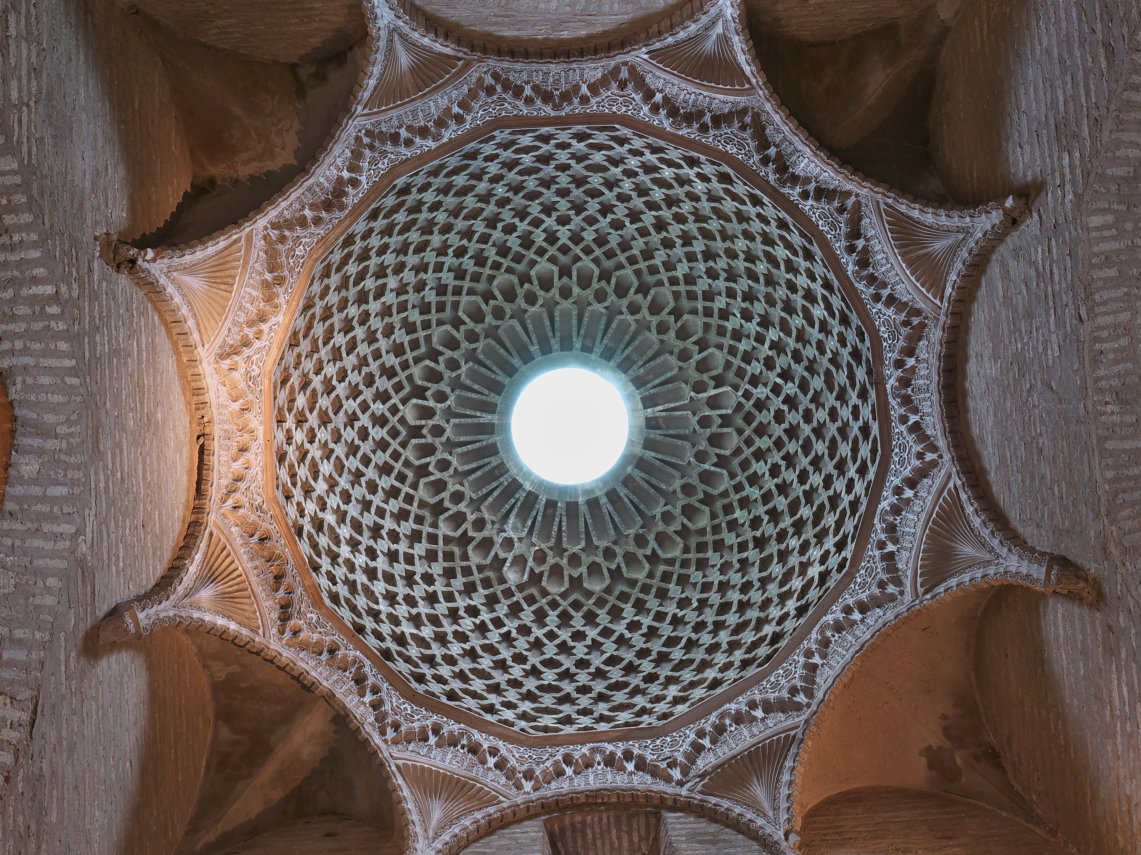 Iglesia de Santa Marina (Sevilla). Destacada cúpula en el arte mudéjar hispalense (tercer cuarto del siglo XIII). Es de admirar el trabajo de lacería con ladrillos y la yesería. Pedro I construye en su palacio de Tordesillas la Capilla Dorada, otra qubba con bóveda de similar tipología. File:Cupula Nervada Las Claras.jpg